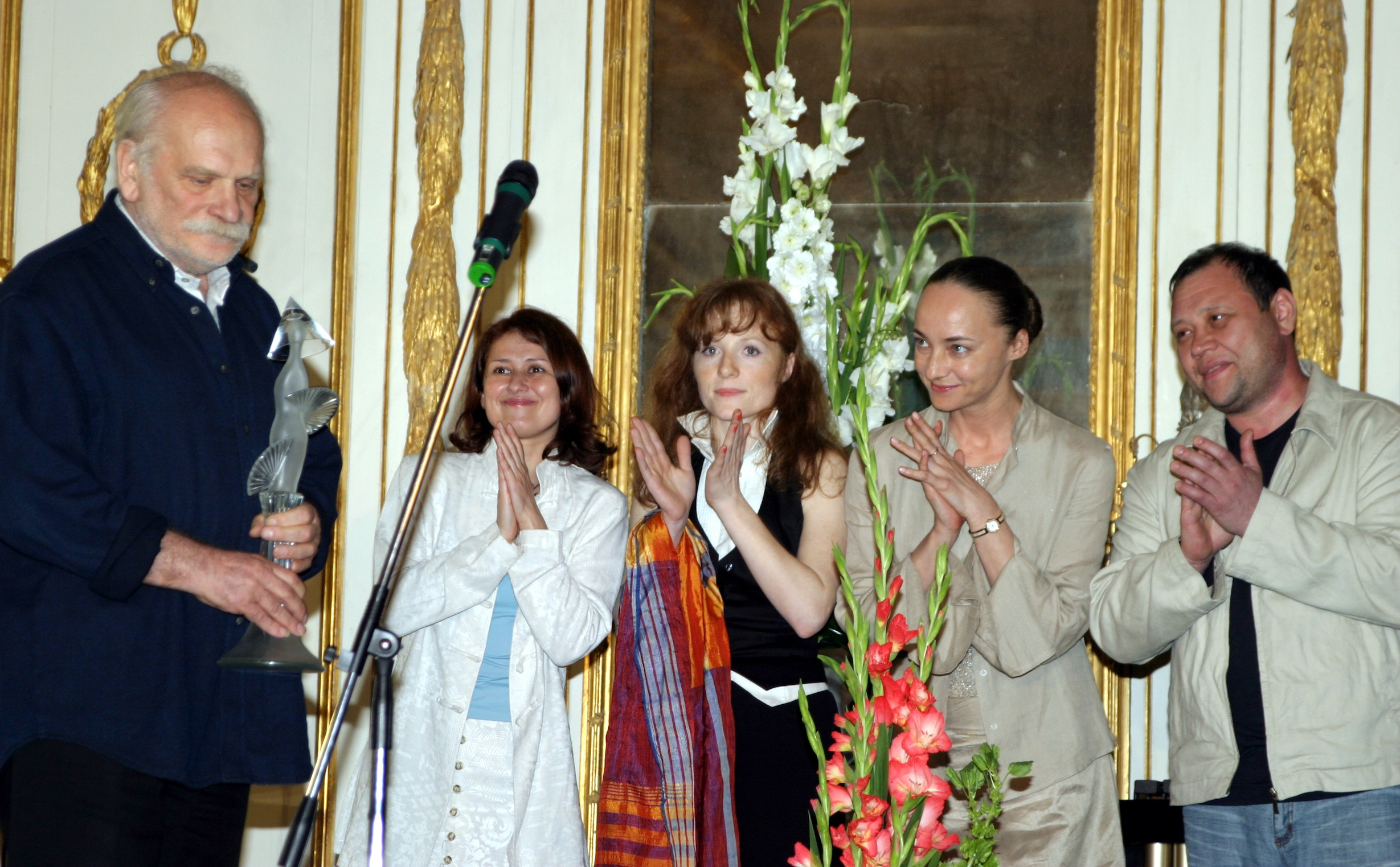 Петр Фоменко и актеры Мастерской Фоменко на вручении премии "Хрустальная турандот"